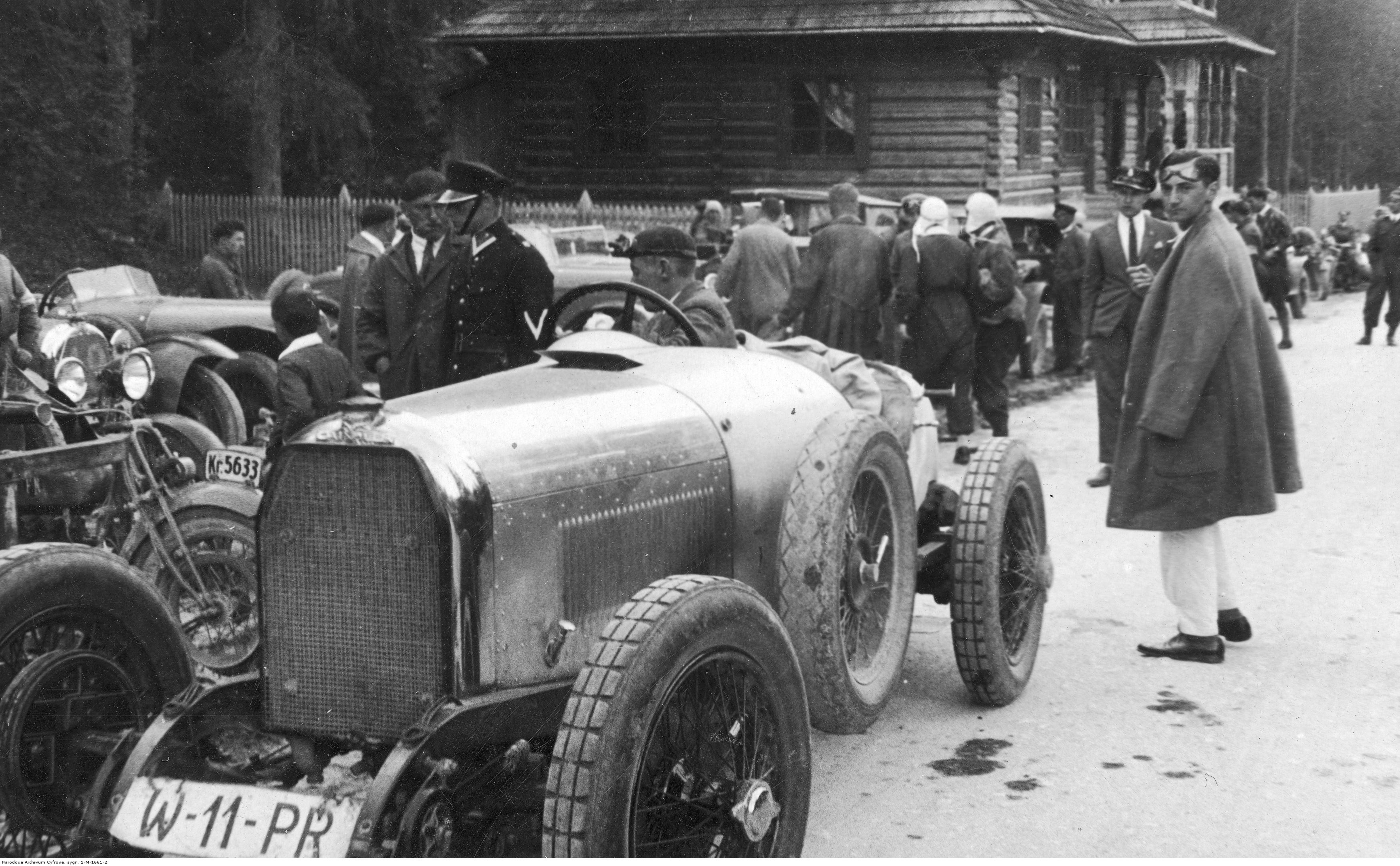 Międzynarodowy Tatrzański Rajd Samochodowy, sierpień 1927 r. Zwycięzca w klasie samochodów wyścigowych Henryk Liefeldt na samochodzie Austro-Daimler. Koncern Ilustrowany Kurier Codzienny - Archiwum Ilustracji. Sygnatura: 1-M-1661-2